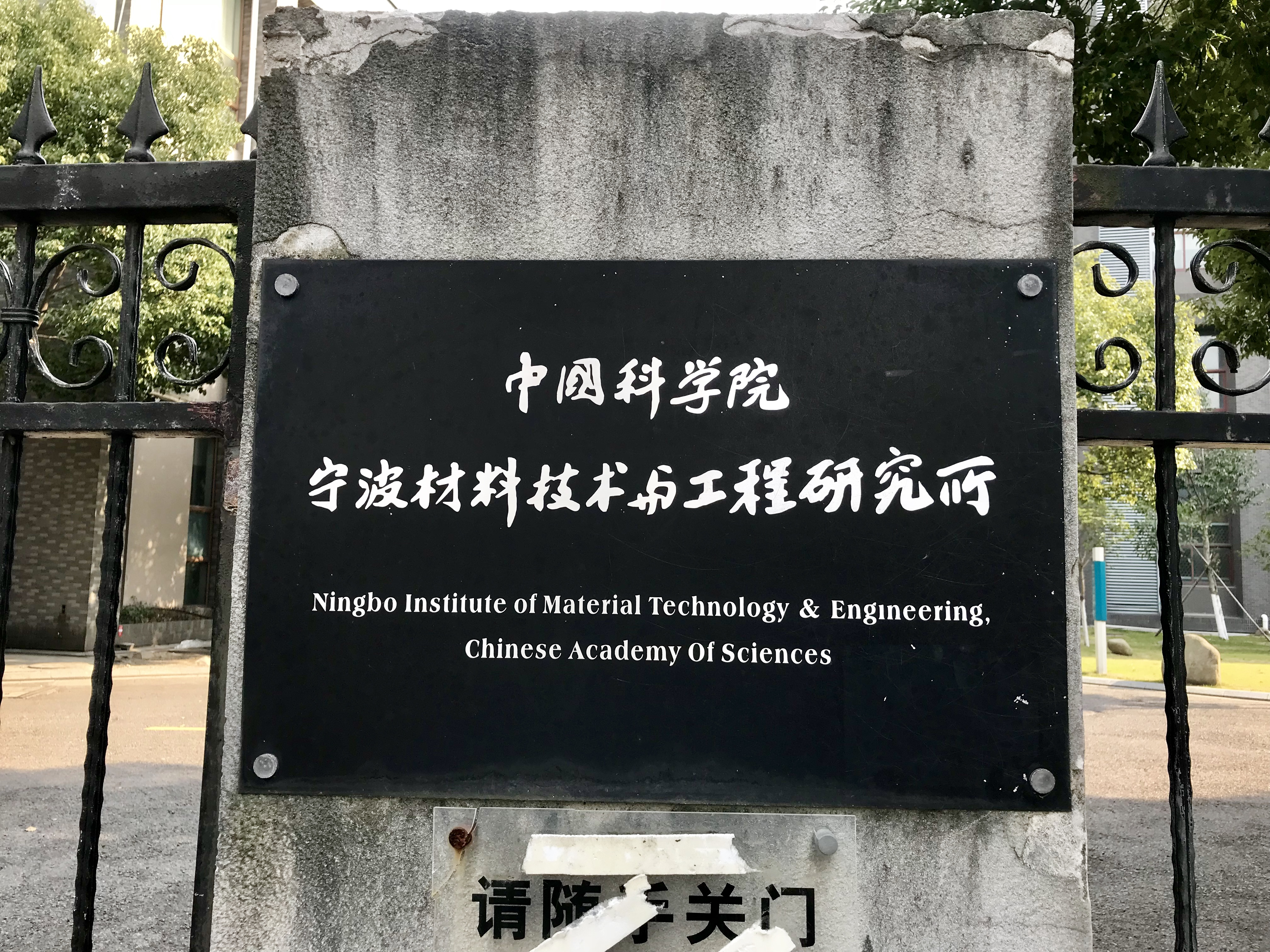 中文（中国大陆）: 中国科学院宁波工业技术研究院标牌